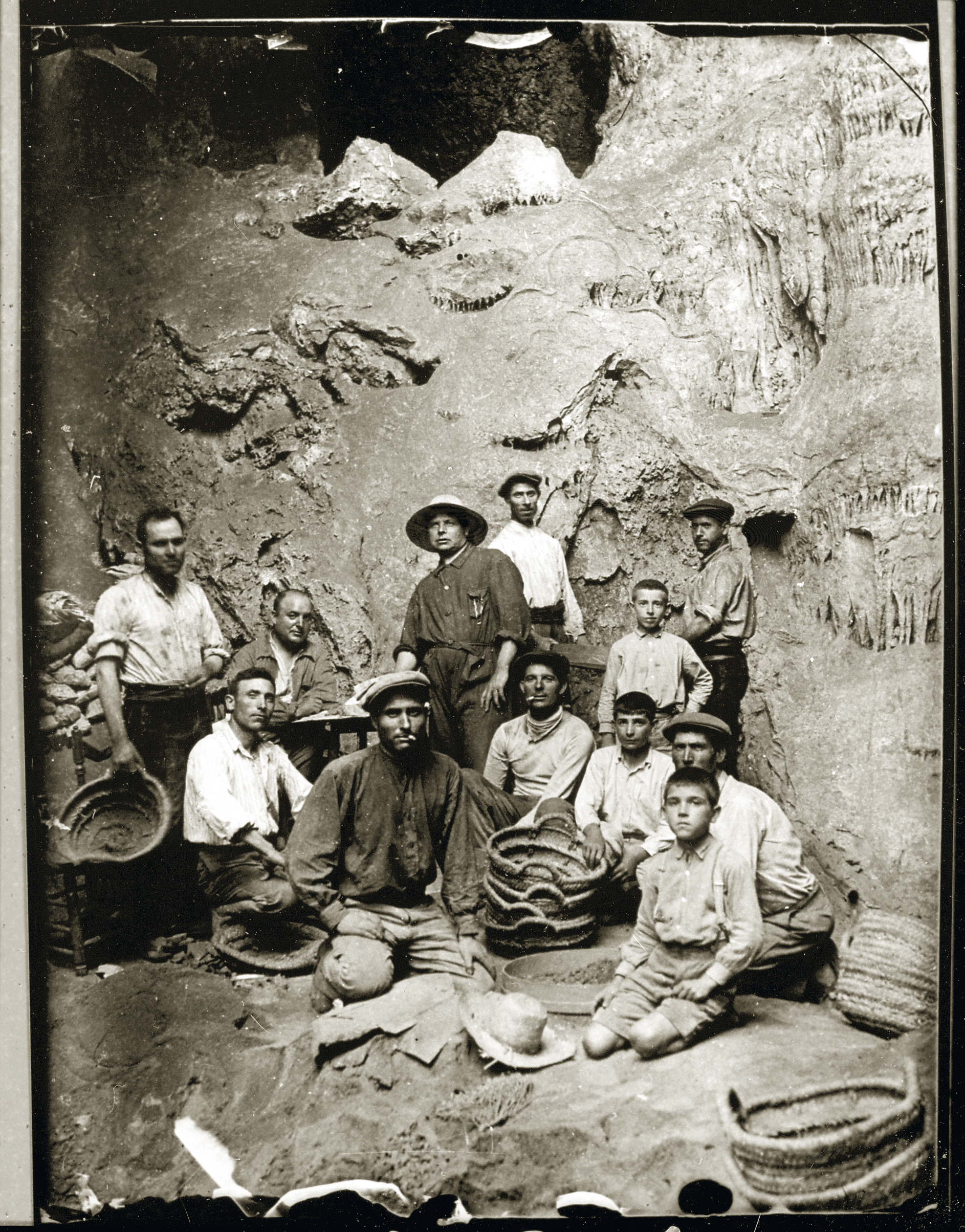 Excavacions del SIP a la Cova del Parpalló, vers 1930.